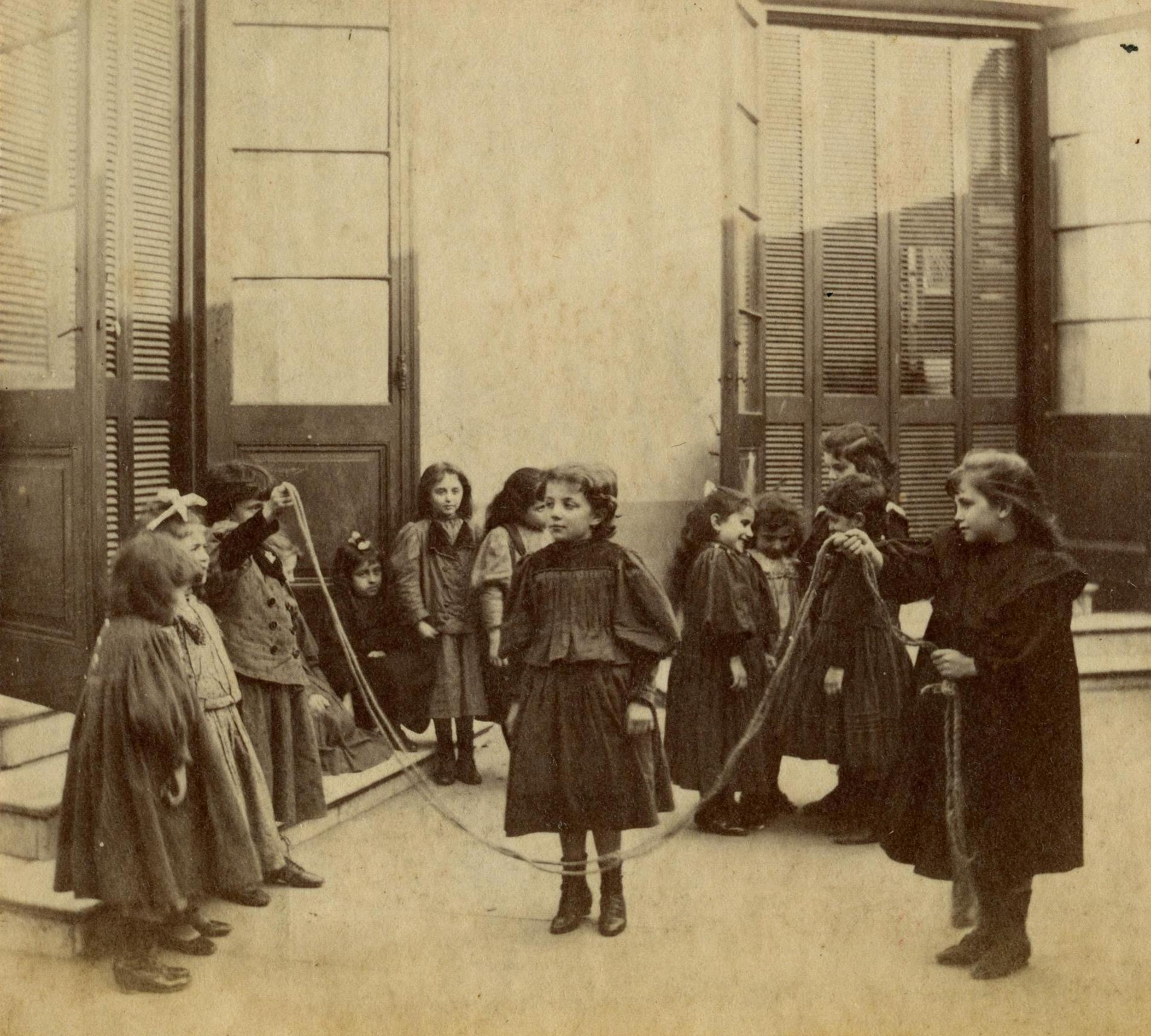 Buenos Aires. Asilo de Huérfanas, niñas saltando a la soga, fines del siglo XIX. Inventario AGN 214889.